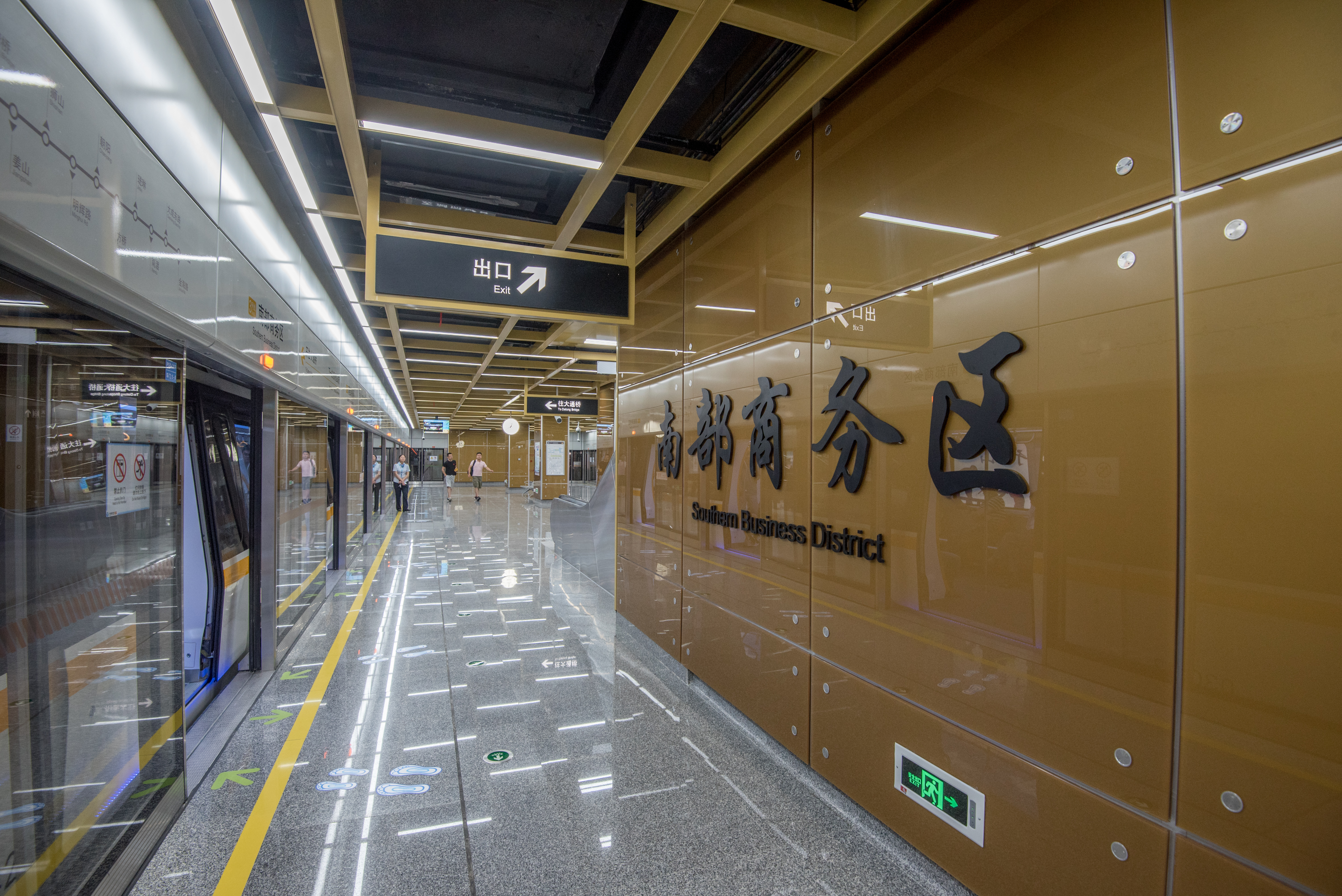 宁波地铁南部商务区站